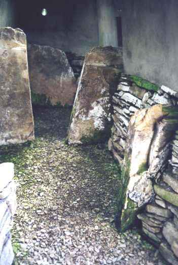 Blackhammer